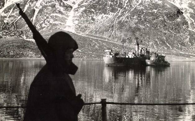 USCG guard in Alaska in WW2.